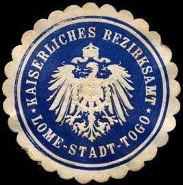 Sealing stamp Title: Kaiserliches Bezirksamt - Lome - Stadt - Togo Description: Kolonie, Kolonial, blau, weiß, geprägt Place: size: 4 cm